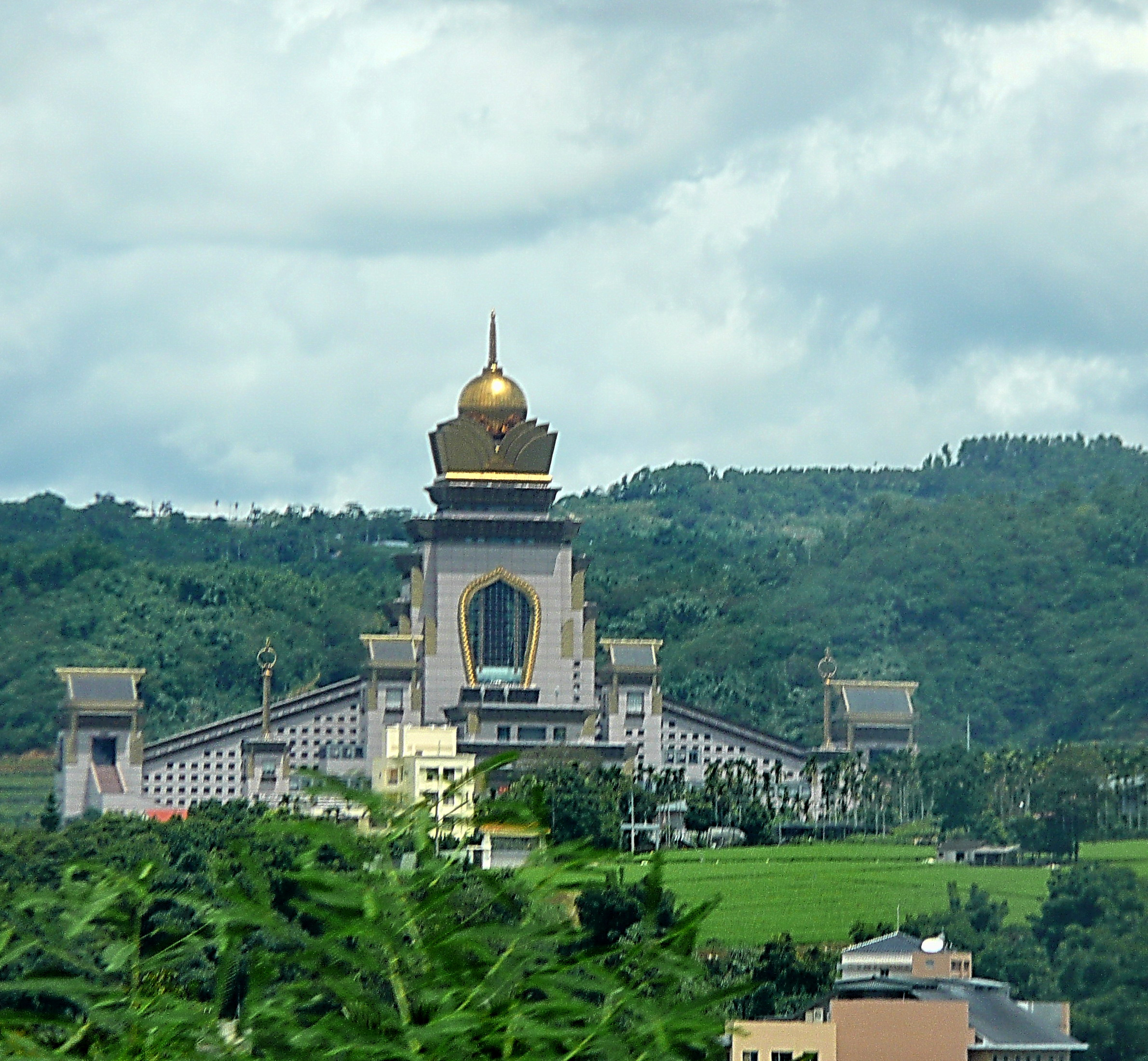 中台禪寺 Chung Tai Chan Monastery